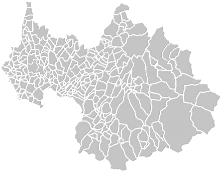 Carte du département de la Savoie, en France, représentant le découpage territorial des différentes communes qui la compose.